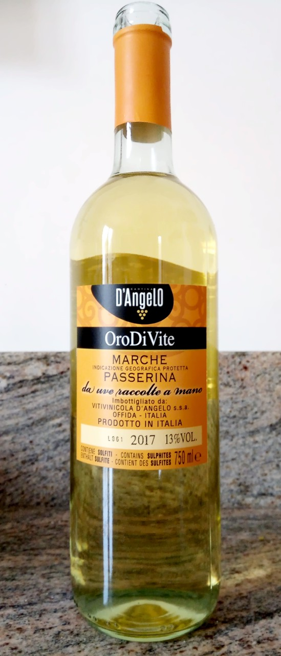 Vino di uva passerina